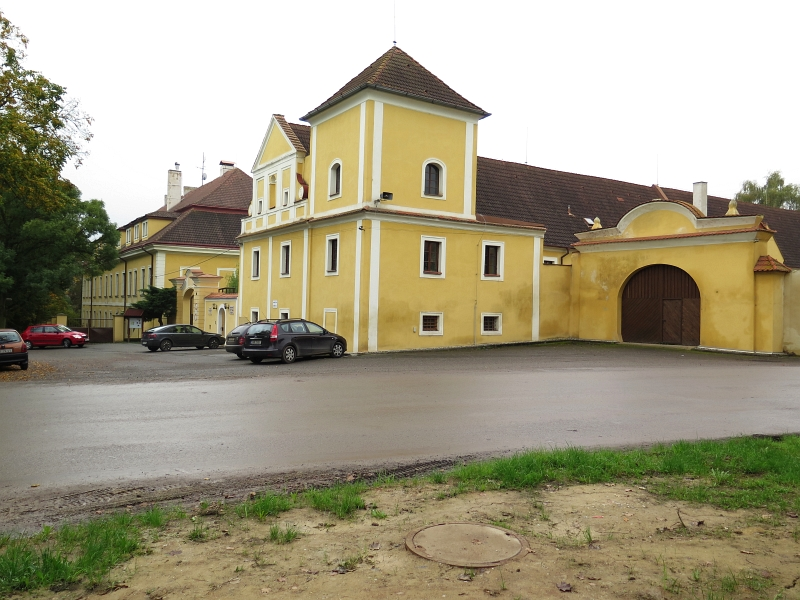 Starý a Nový zámek Kolešovice, Kolešovice 180, Kolešovice.